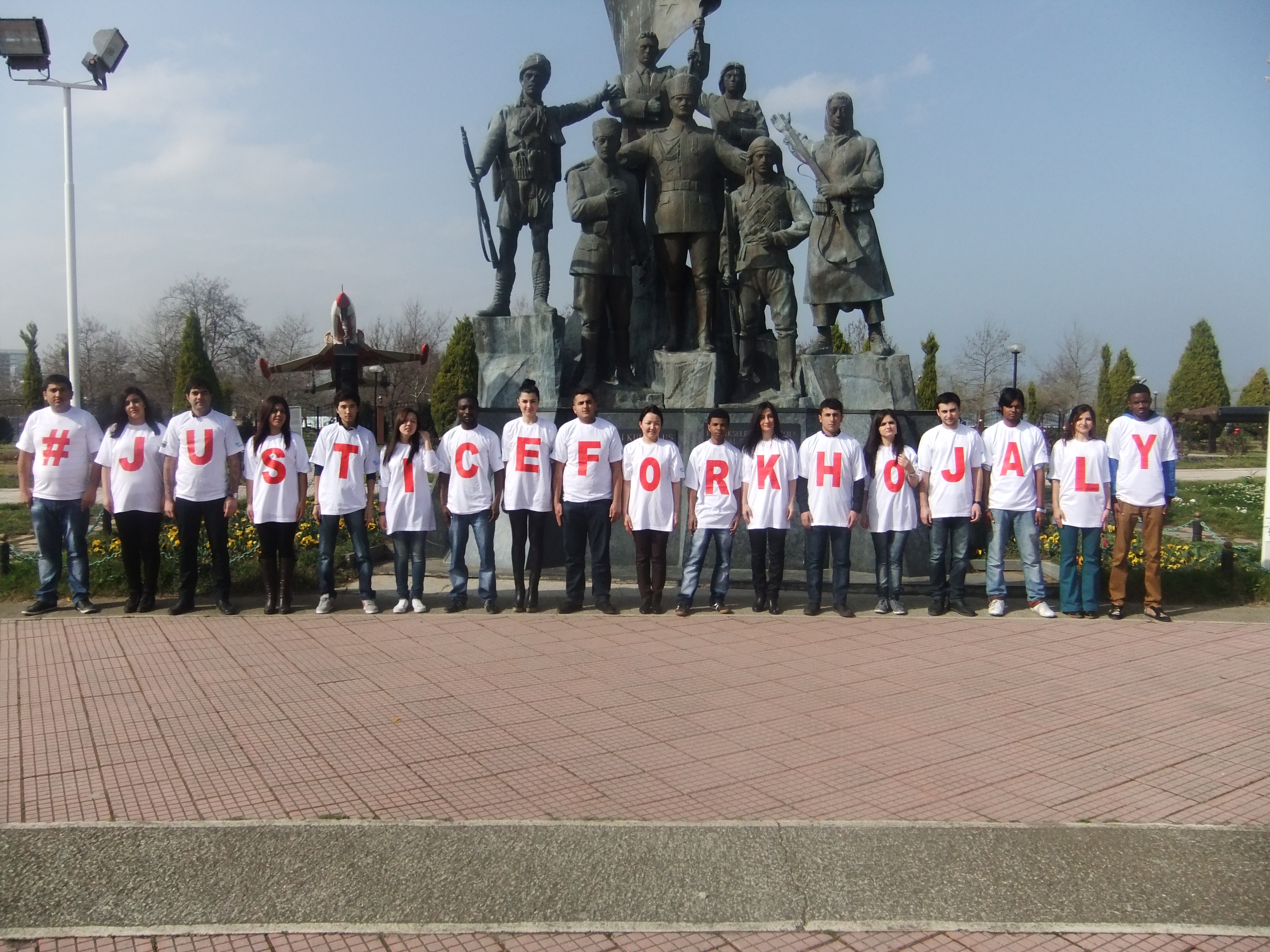 25 fevral 2013-cü il tarixində Türkiyə Cümhuriyyətinin Samsun şəhərində, Ondokuz Mayıs Universitetində Xocalı soyqırımını anma tədbiri.